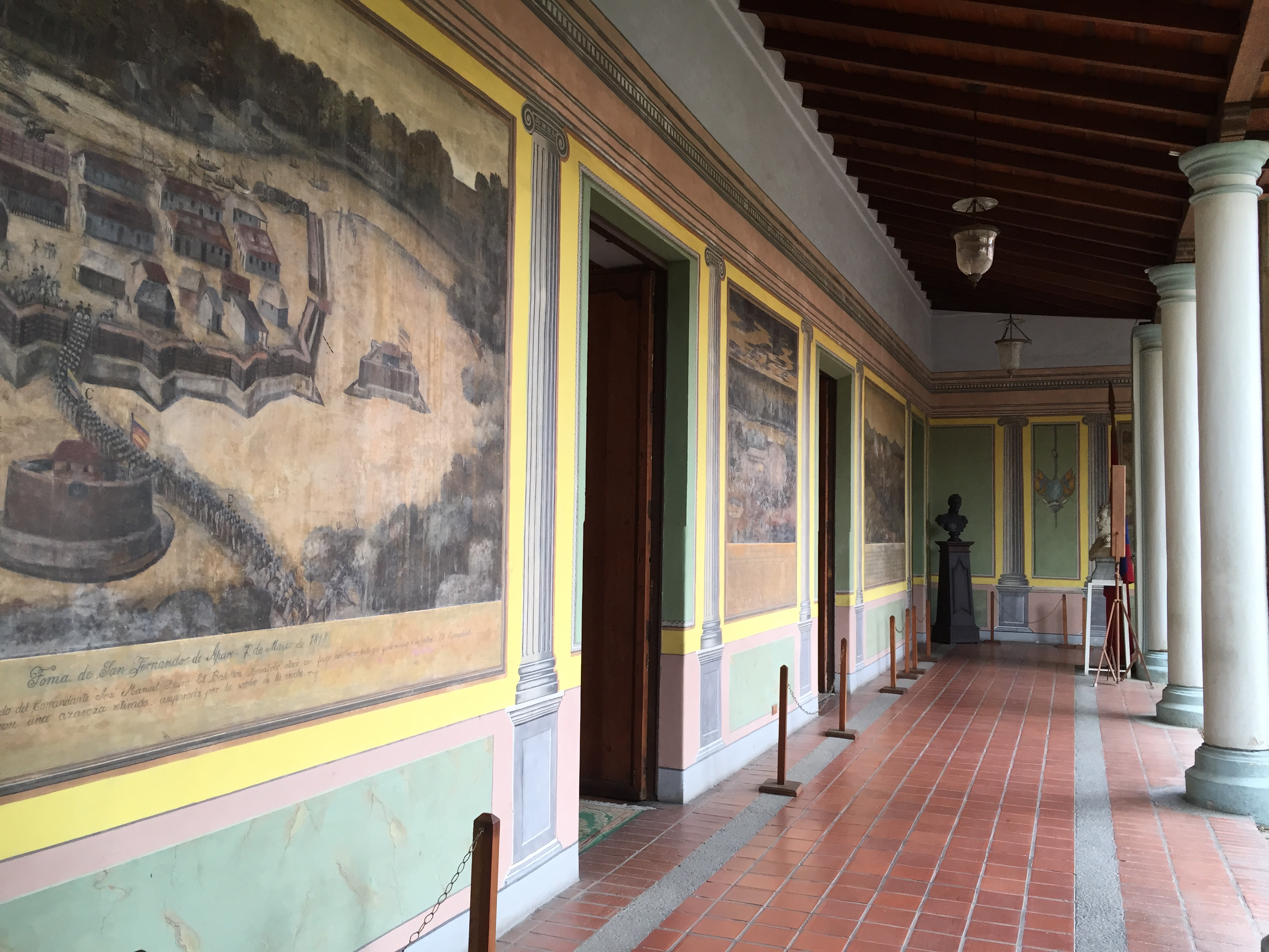 Casa Páez en el centro de Valencia, estado Carabobo, Venezuela.